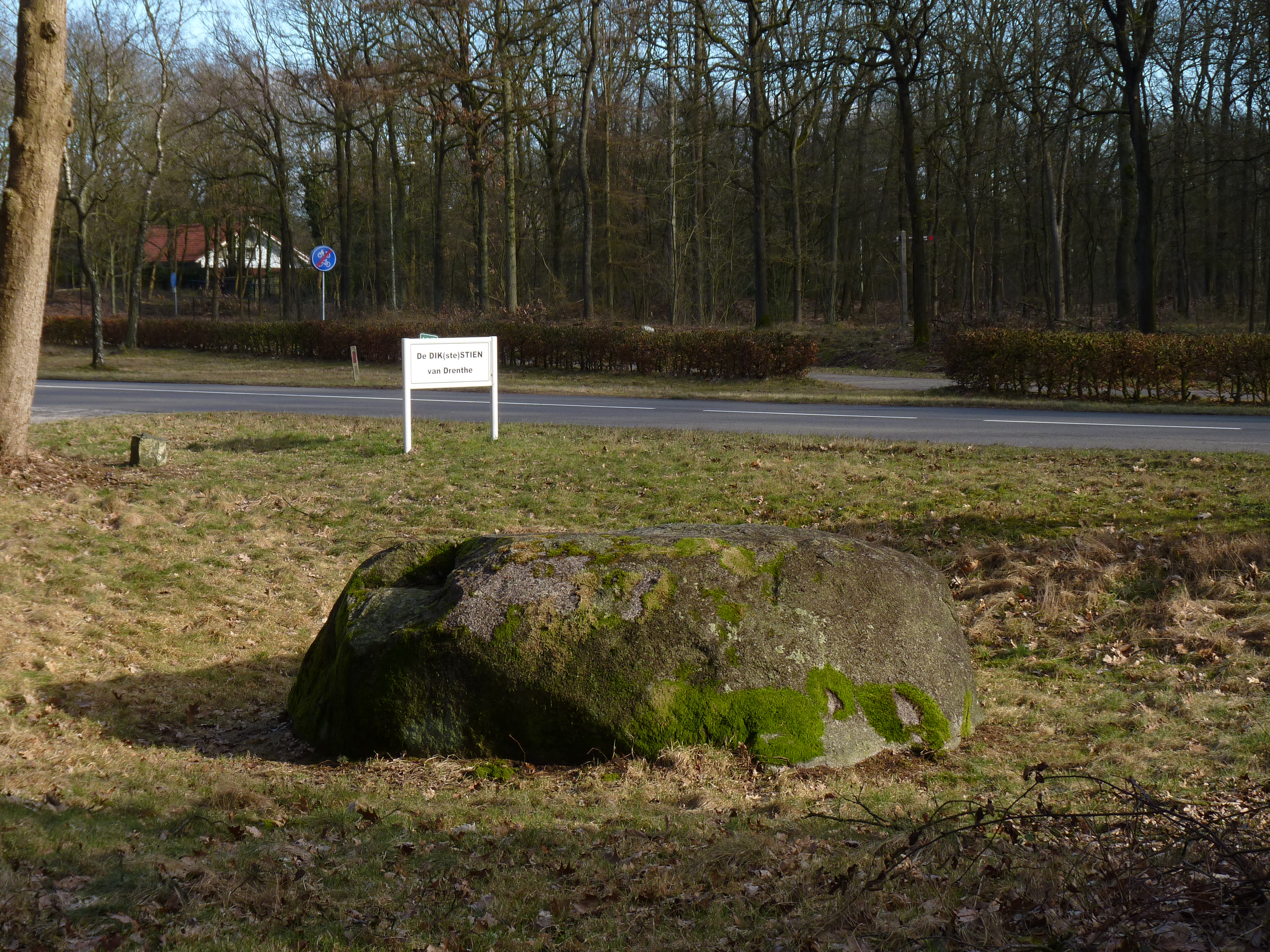 "De DIK(ste)STIEN van Drenthe" foutief aangemerkt als hunebed D48 Emmen Drenthe (NL)